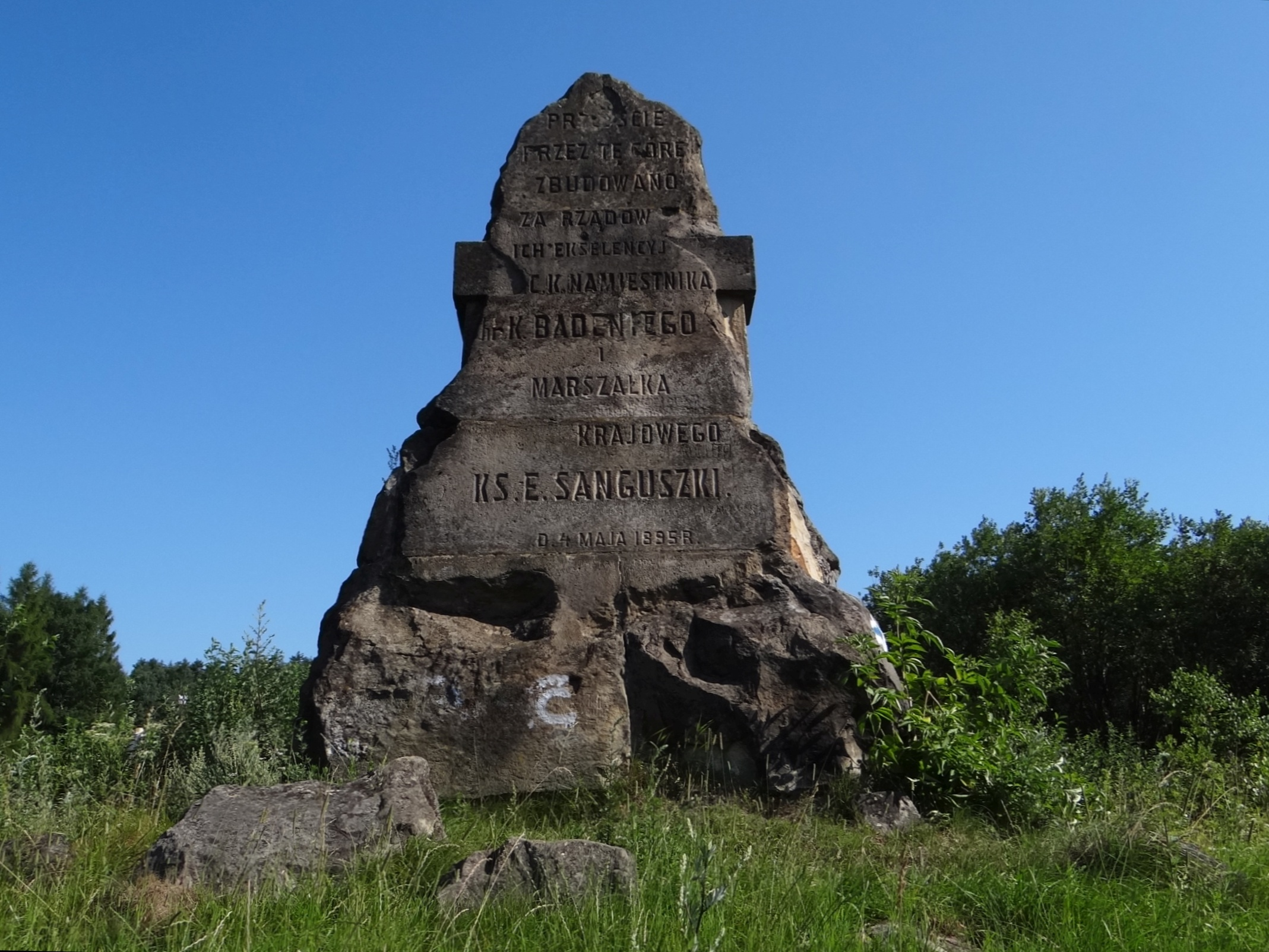 Przełęcz Sanguszki. Pomnik E. Sanguszki